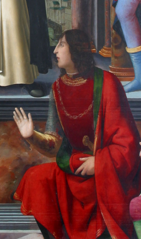 Pandolfo IV Malatesta, signore di Rimini, dettaglio della pala di Domenico Ghirlandaio